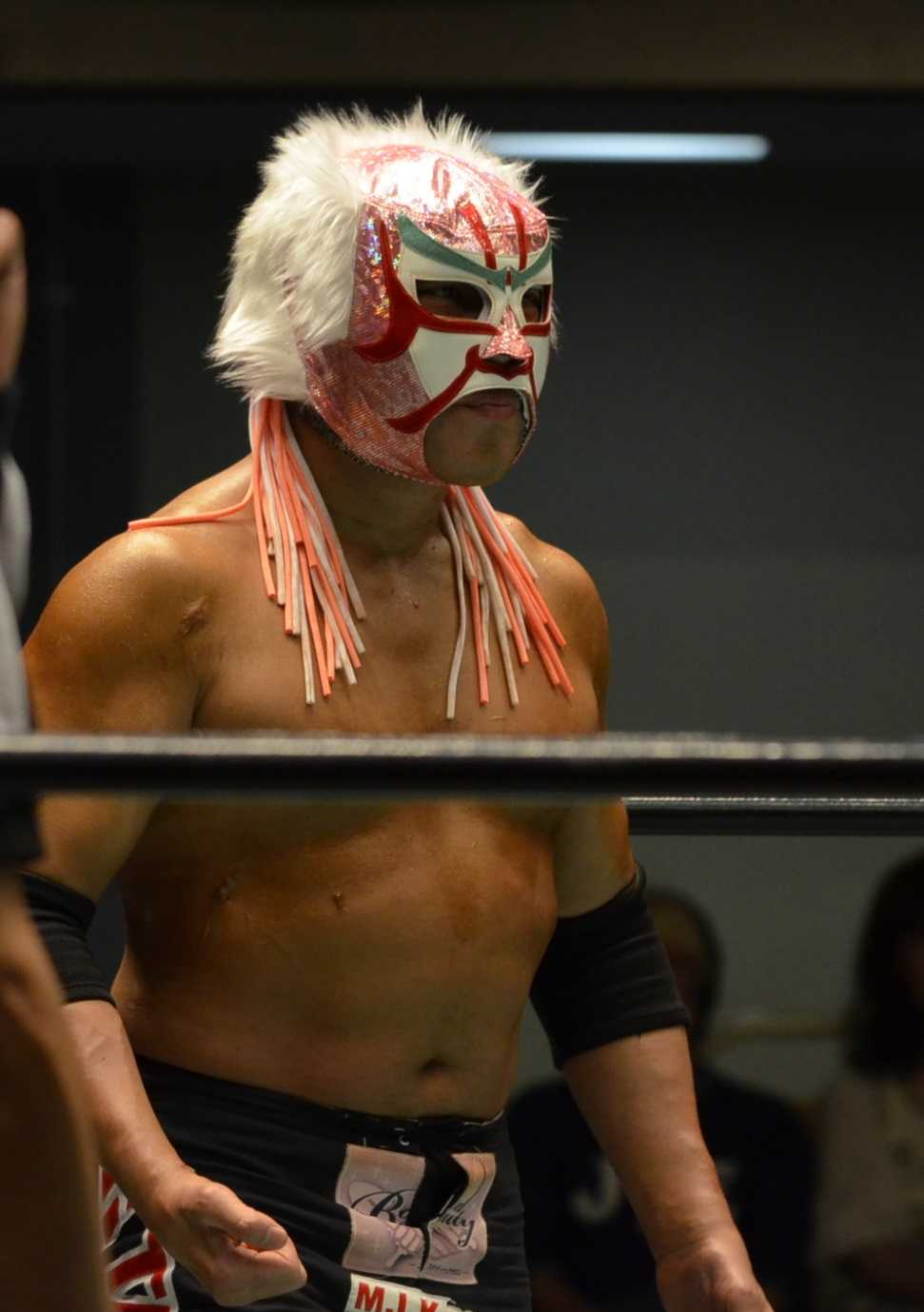 マスターサスケ